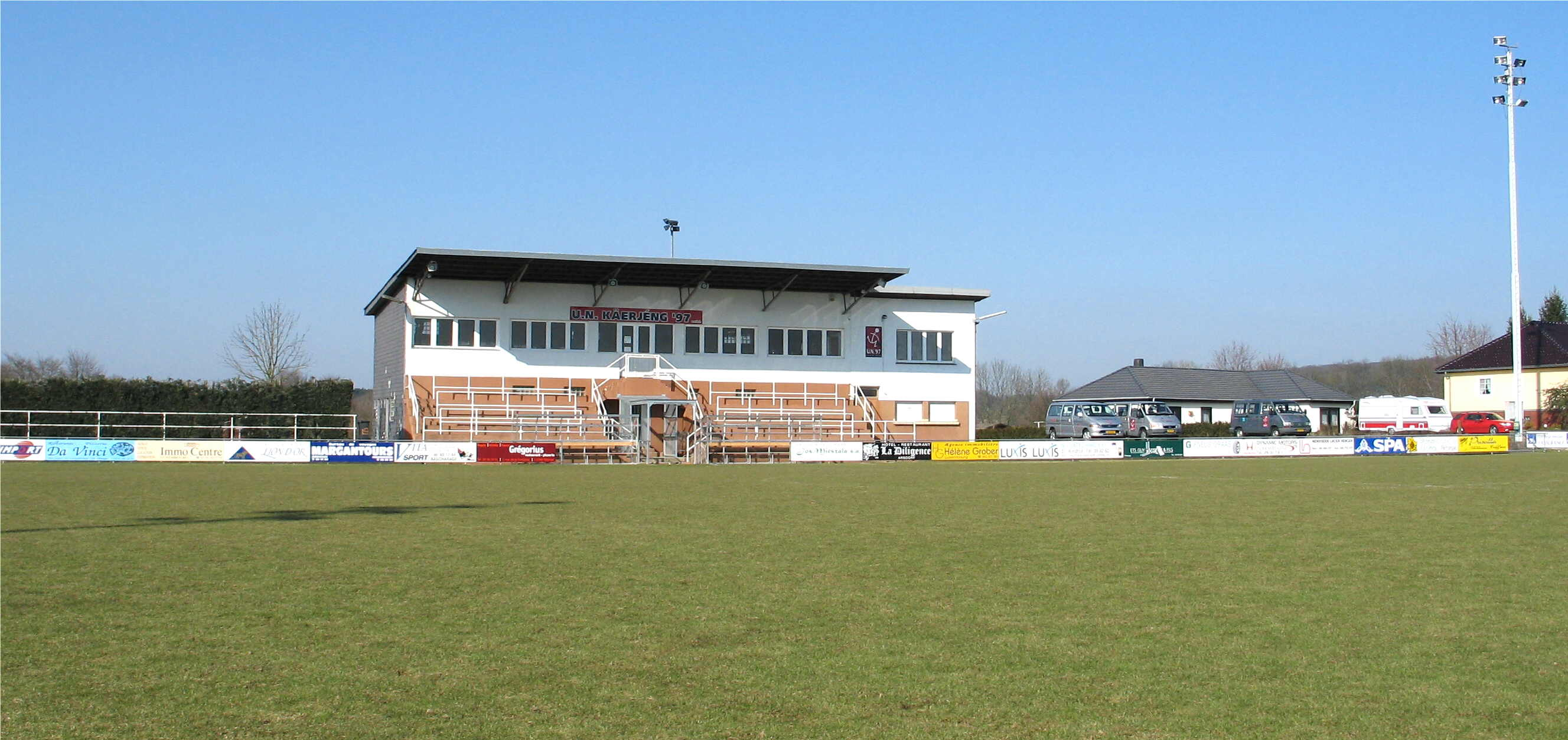 Den Terrain vum U.N. Käerjeng '97 zu Uewerkäerjeng